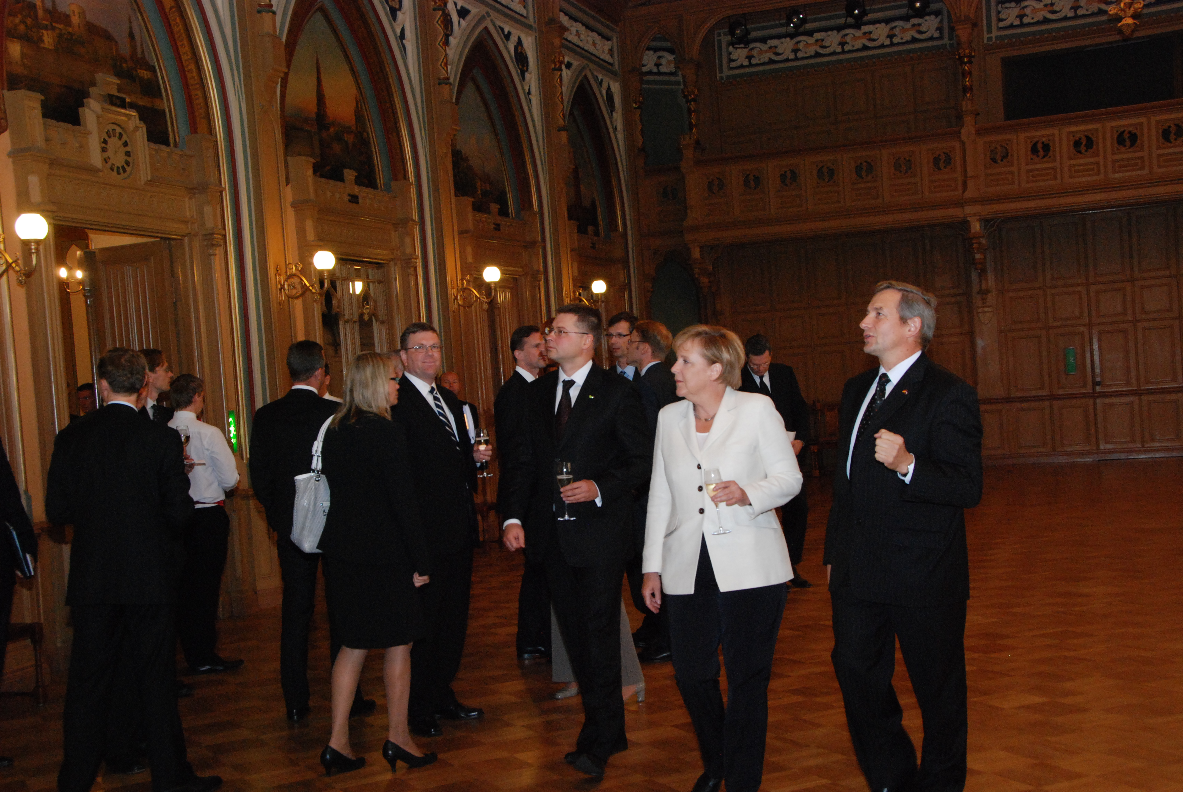 Profesors Ojārs Spārītis (no labās) iepazīstina Vācijas kancleri Angelu Merkeli un Ministru prezidentu Valdi Dombrovski ar Mazo Ģildi Foto: Aivis Freidenfelds, Valsts kanceleja